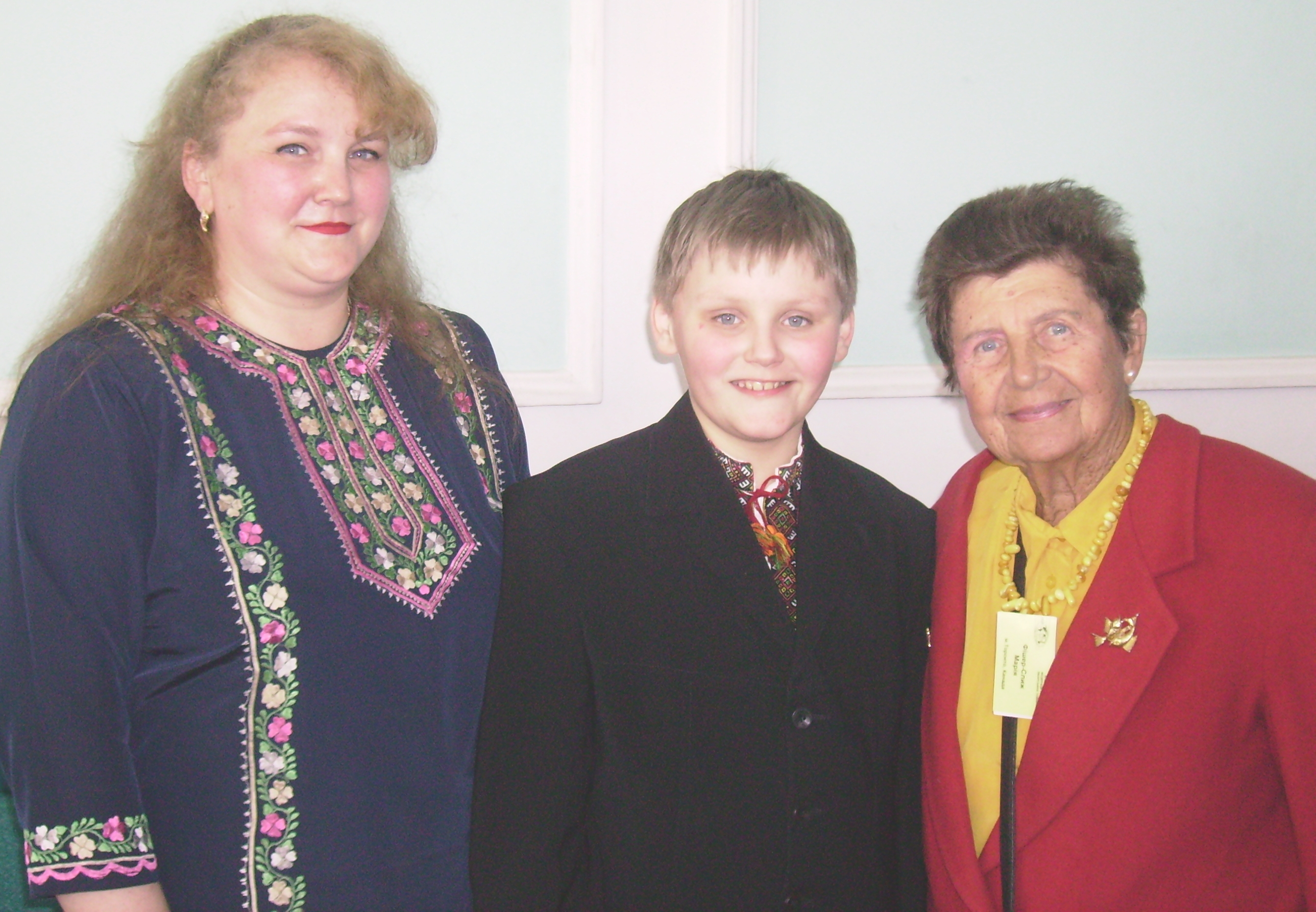 Ганна і Іван Барани і Марія Фішер-Слиж